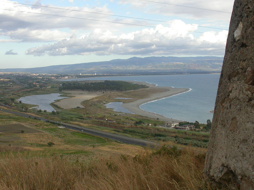 Piana di Sant'Eufemia, il “maricello” una delle ultime zone umide della piana di S.Eufemia ripresa dalle colline prospicenti Capo Suvero